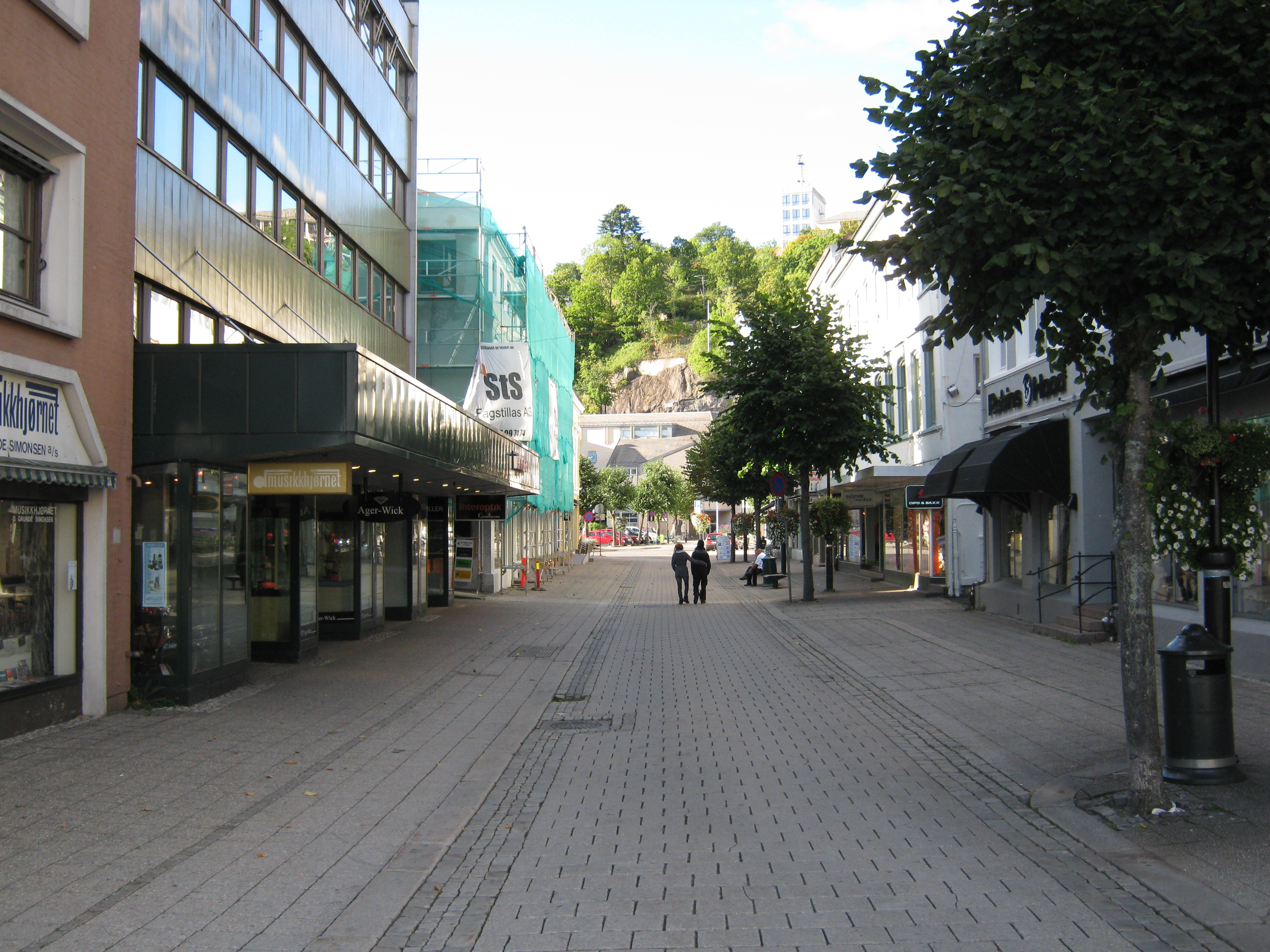 Havnegaten i Arendal